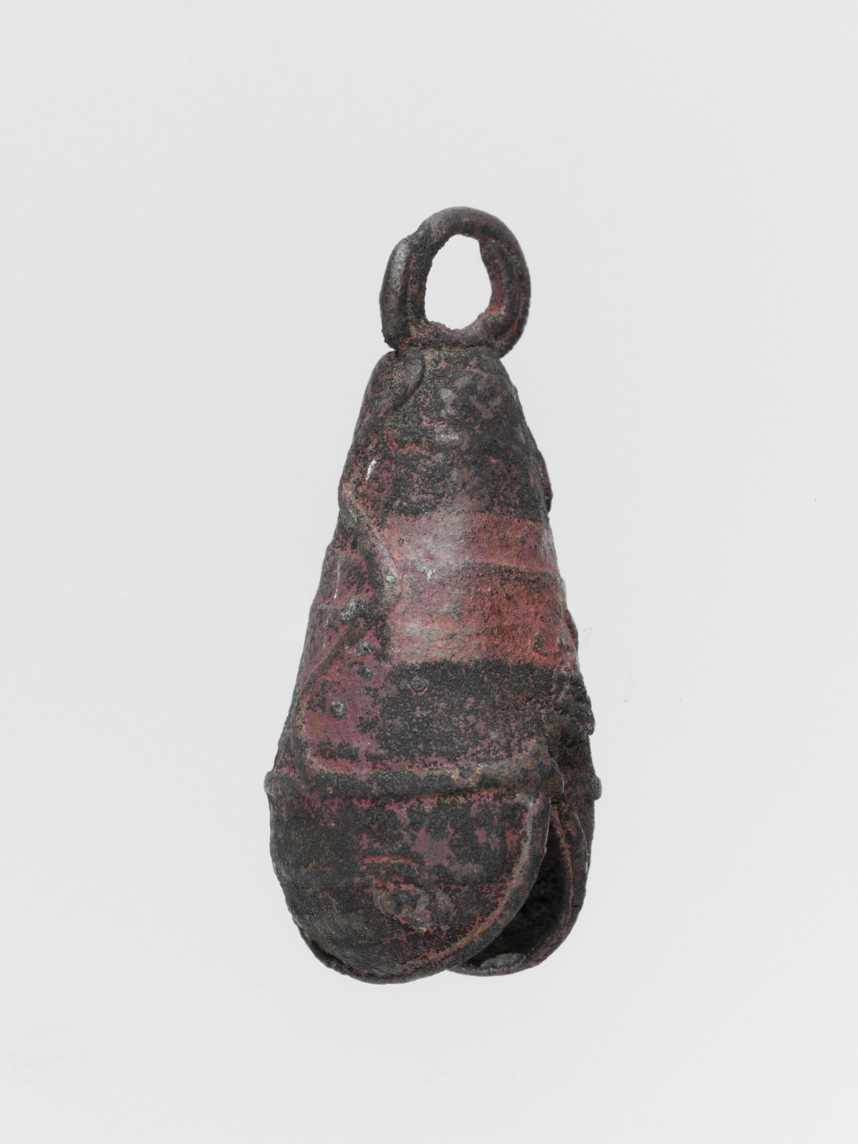 Aztec; Tzilinilli; Idiophone-Shaken-crotal bell